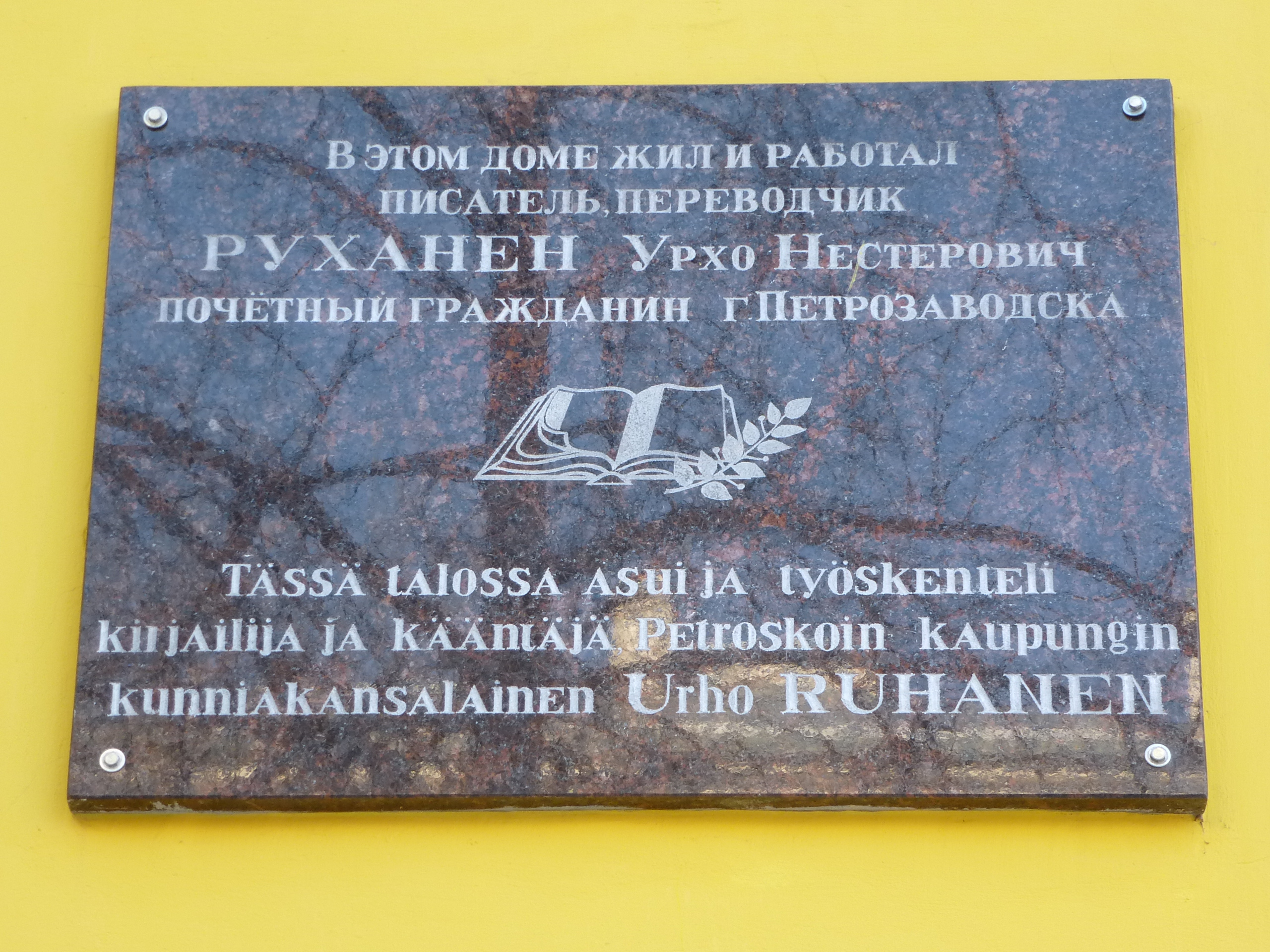 Мемориальная доска Руханен У.Н. в Петрозаводске на пр.Ленина д.15